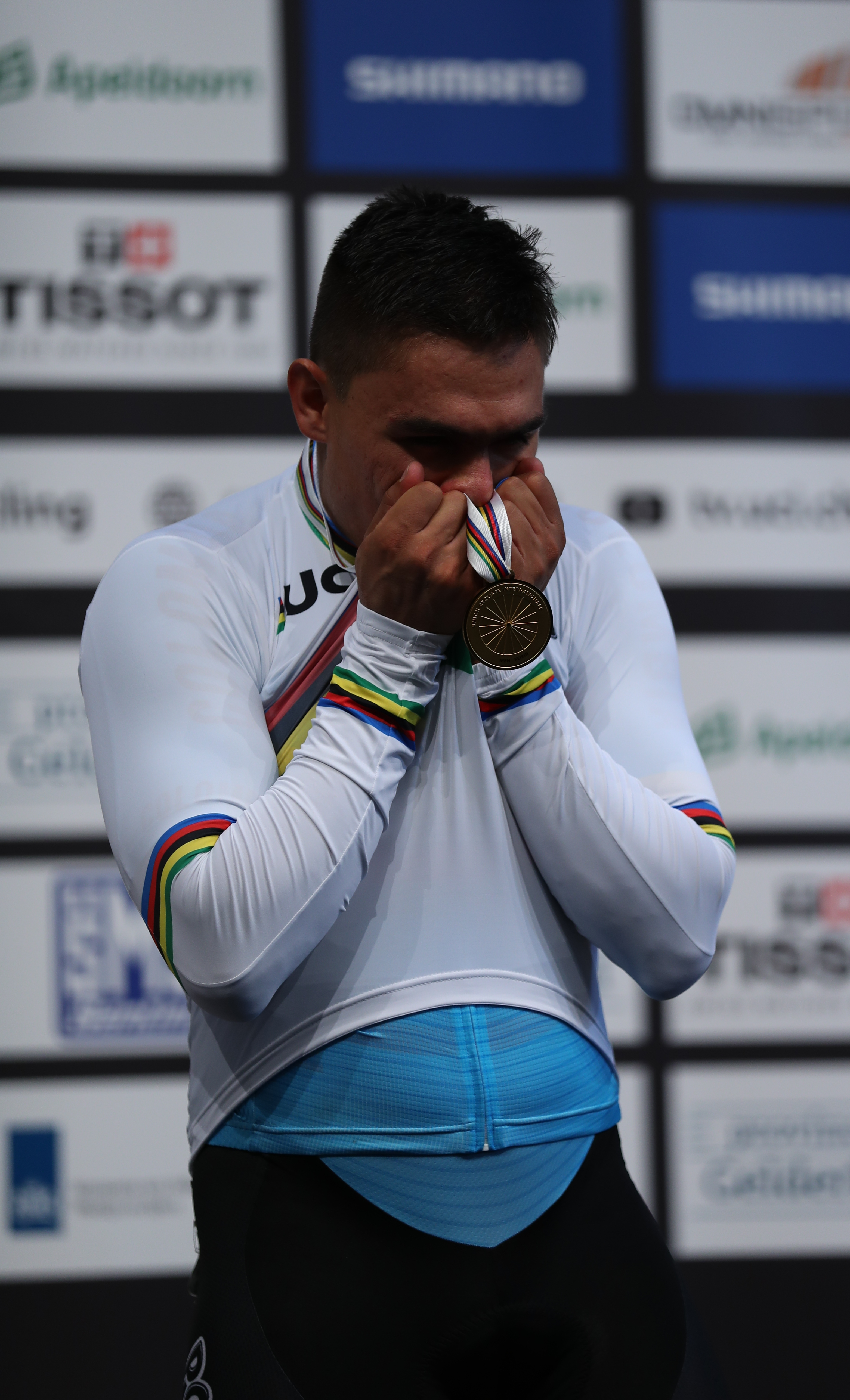 Fabián Puerta, kolumbianischer Radsportler - Weltmeister im Keirin